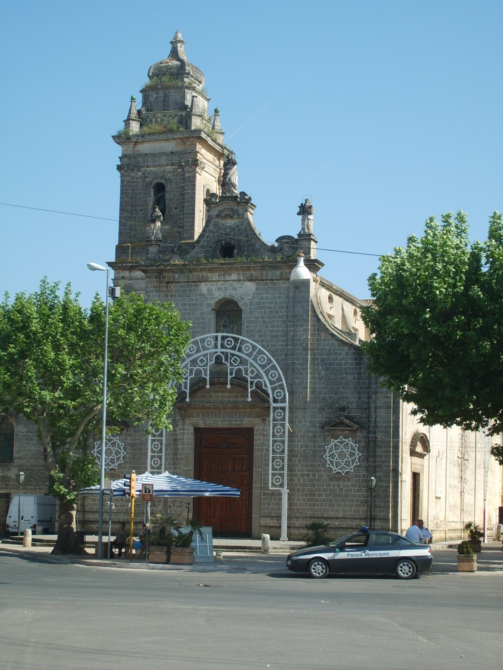 Santuario di Santa Maria della Croce